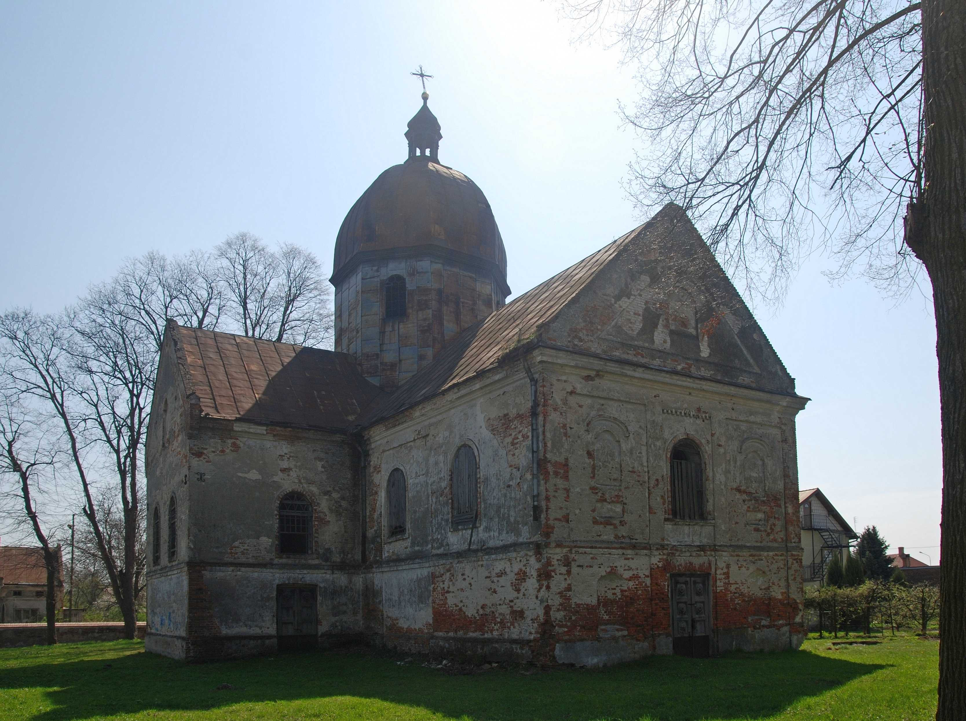 miasto Oleszyce